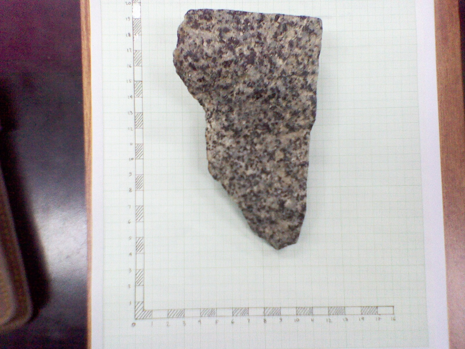 Batuan Beku Granit, yang merupakan salah satu jenis batuan beku ekstrusif. (Laboratorium Petromine, Universitas Padjadjaran)